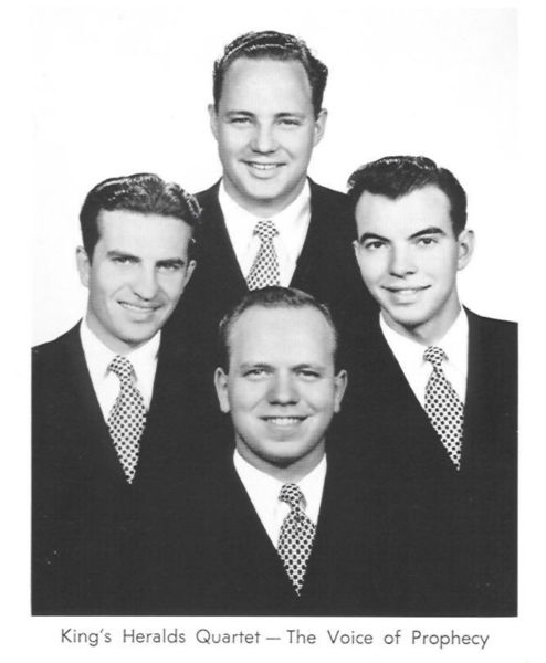 Heraldos del Rey 1950